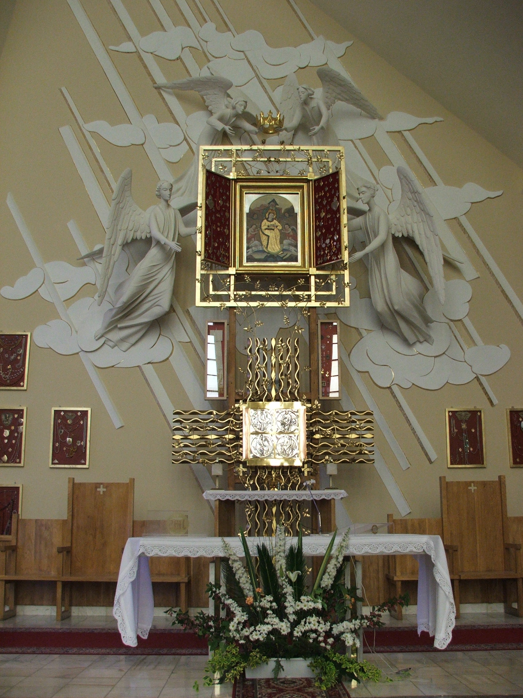 Ołtarz główny w sanktuarium pasierbieckim